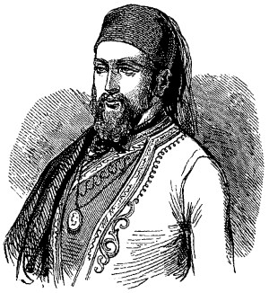 Danilo Petrović Njegoš, Prince of Montenegro (May 25, 1826 – August 13, 1860).